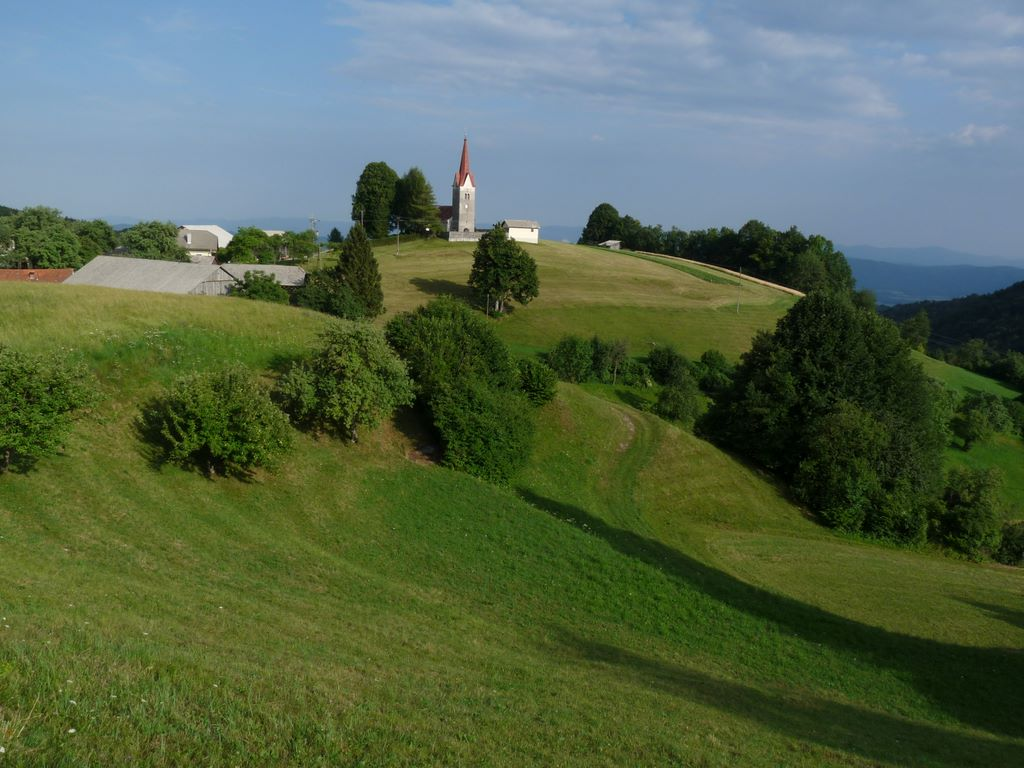 Sv. Lovrenc v Prelesju